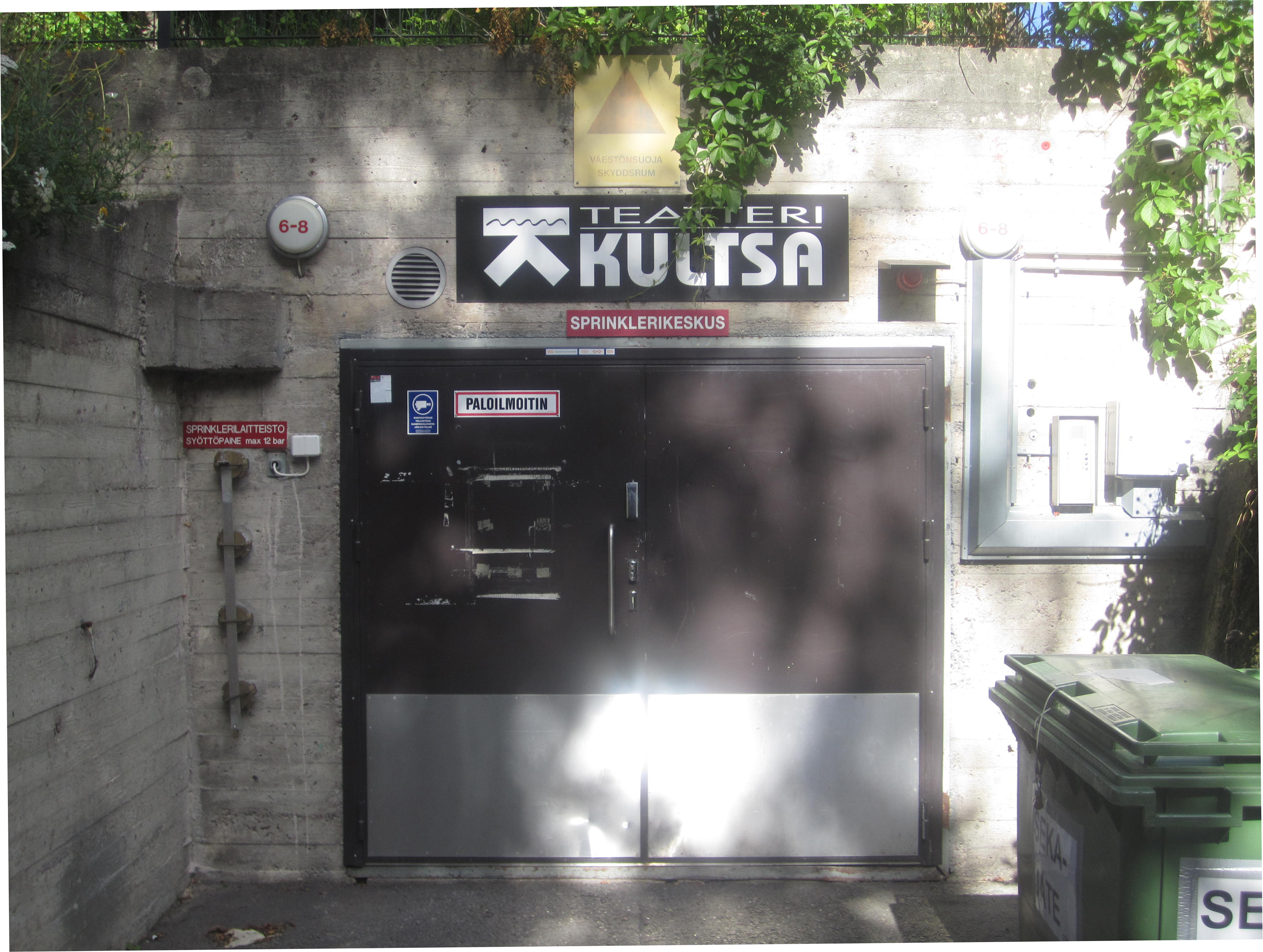 Teatteri Kultsa Helsingissä.